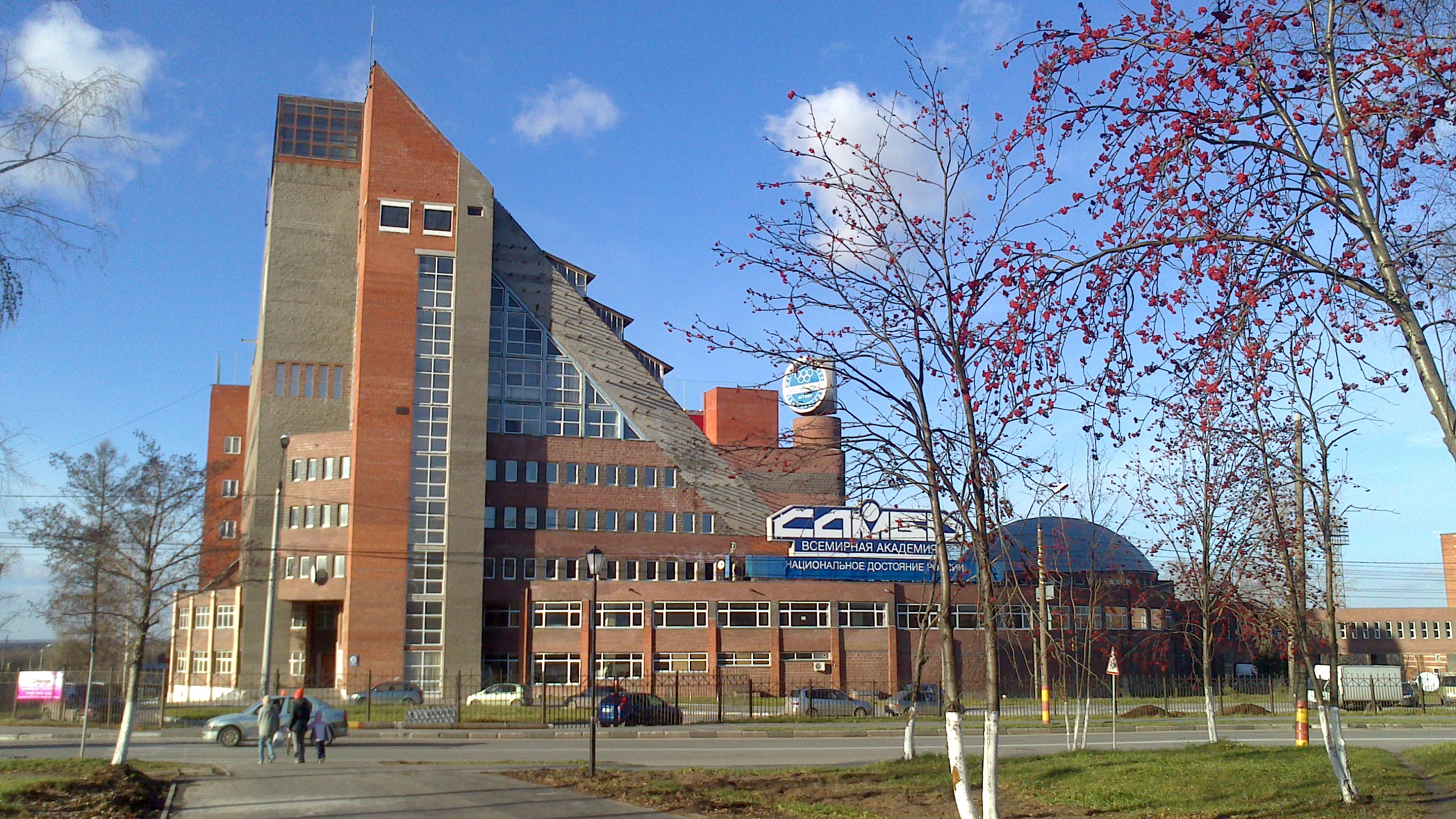 Спортивный комплекс «Всемирная академия самбо», г. Кстово